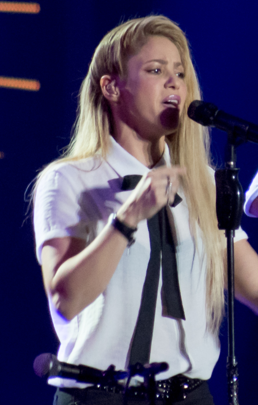 Shakira und Chris Martin beim Global Citizen Festival 2017